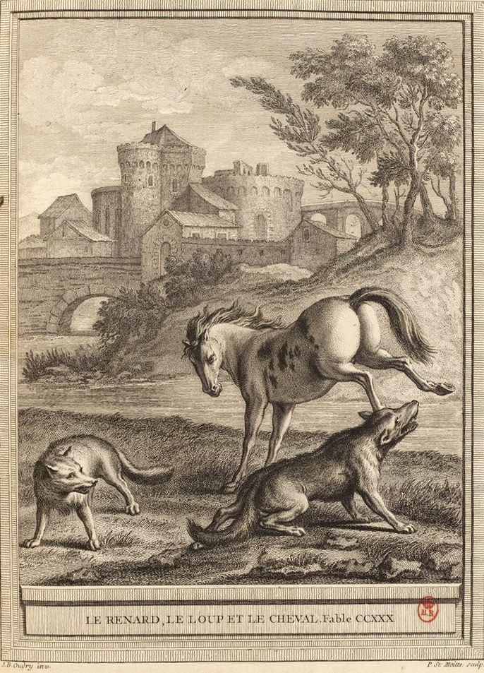 Gravure réalisée par Pierre Etienne Moitte d'après un dessin de Jean-Baptiste Oudry représentant la fable Le renard, le loup et le cheval de Jean de La Fontaine (fable 17 du livre XII). Cette gravure est parue dans l'édition complète des fables de La Fontaine, parue en quatre tomes chez l'éditeur Desaint & Saillant, rue saint Jean de Beauvais à Paris, 1755-1759.